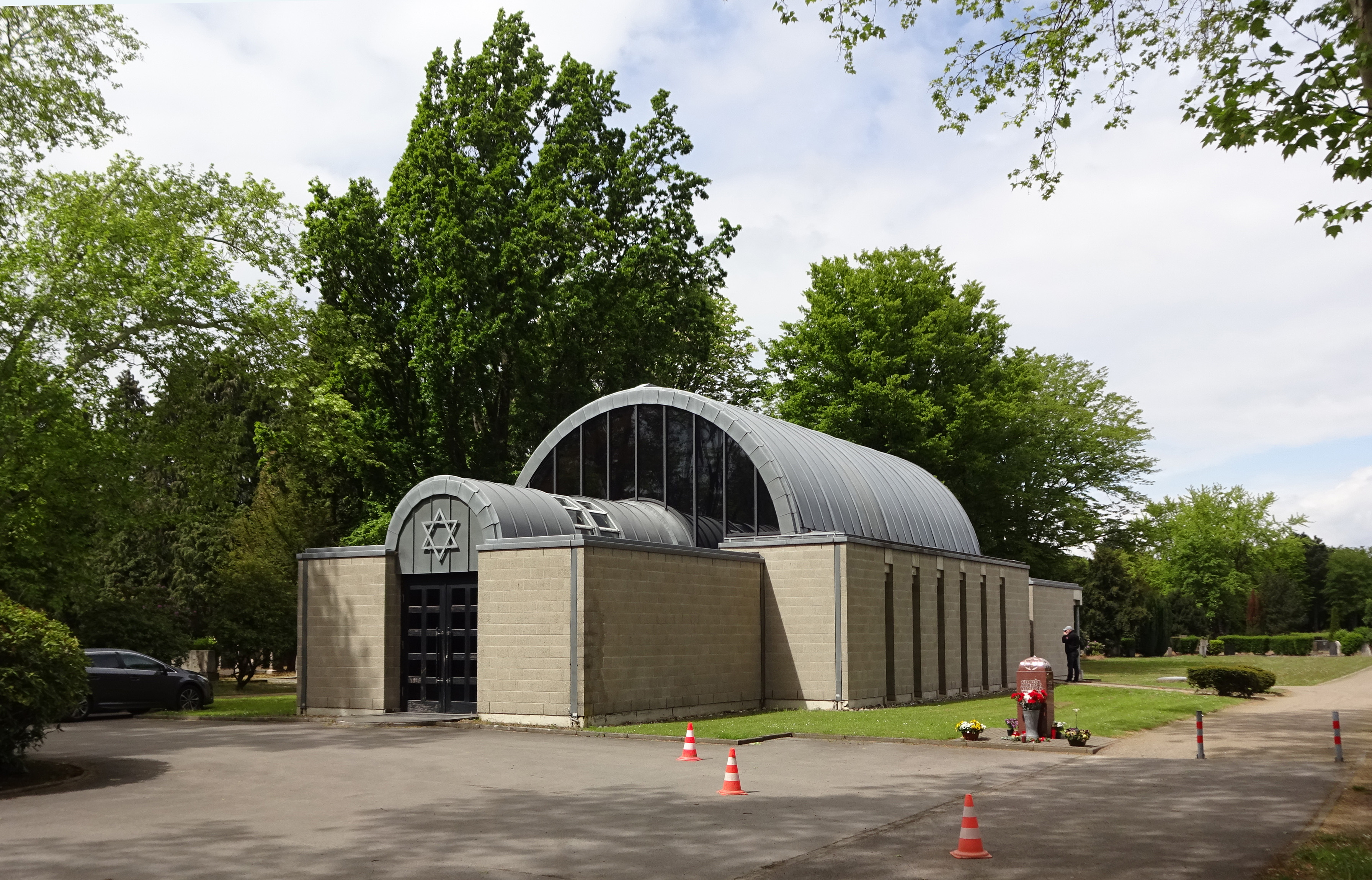 Trauerhalle mit Gedenkstätte der jüdischen Gemeinde Düsseldorf, auf dem Gebiet des Nordfriedhofs